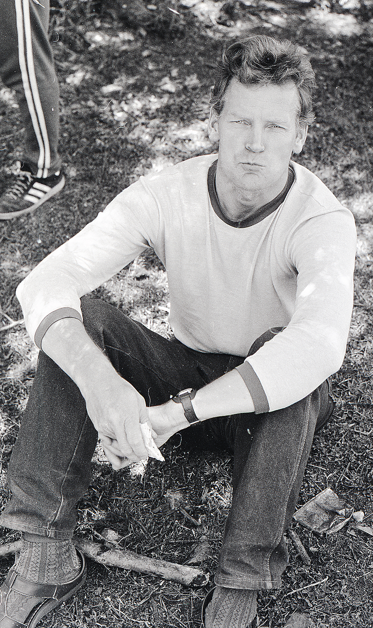 Vello Park